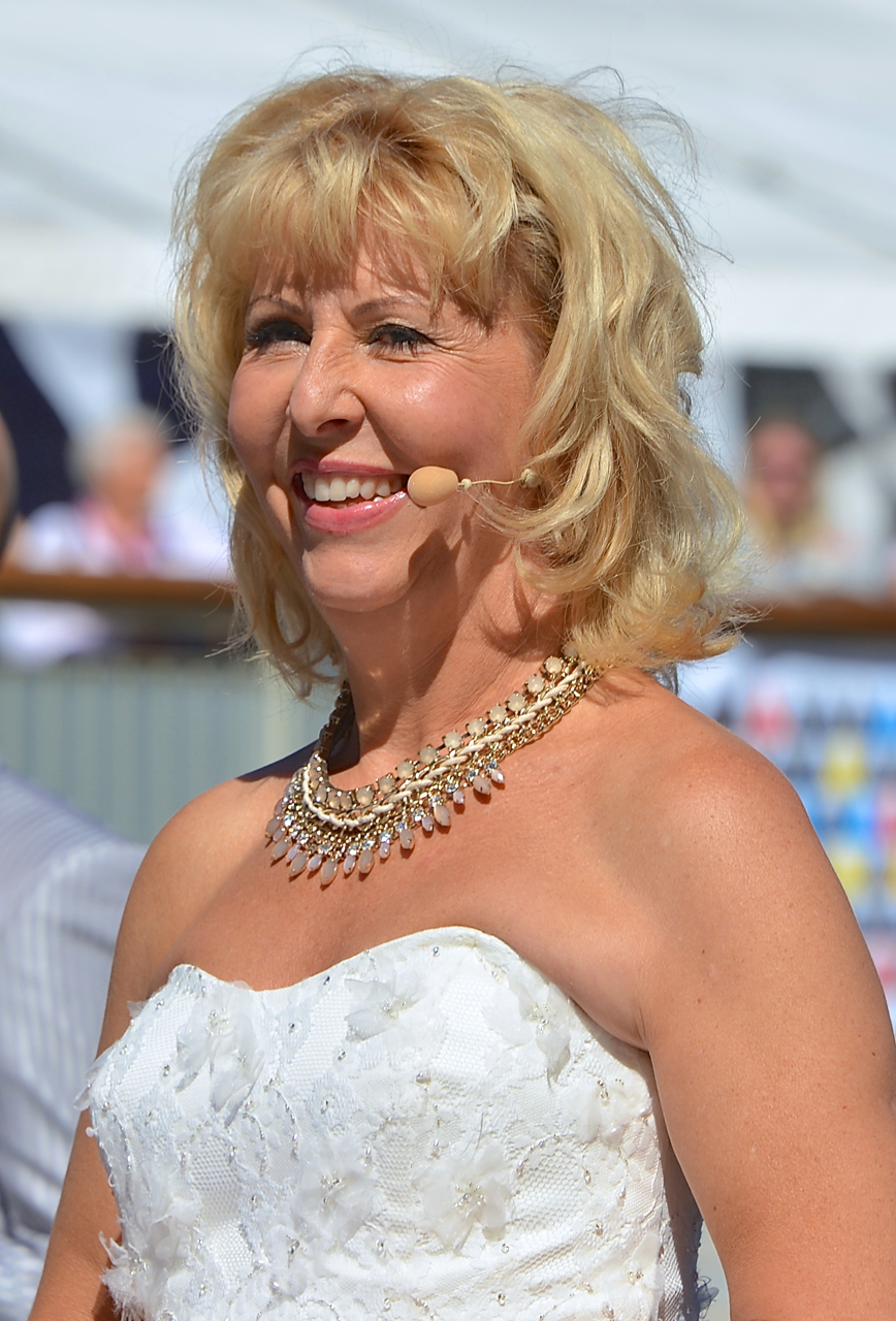 Pia Johansson på Sergels torg under Stockholms Kulturfestival 2013. Smakprover ges ur den kommande säsongens föreställningar på Stockholms Stadsteater.